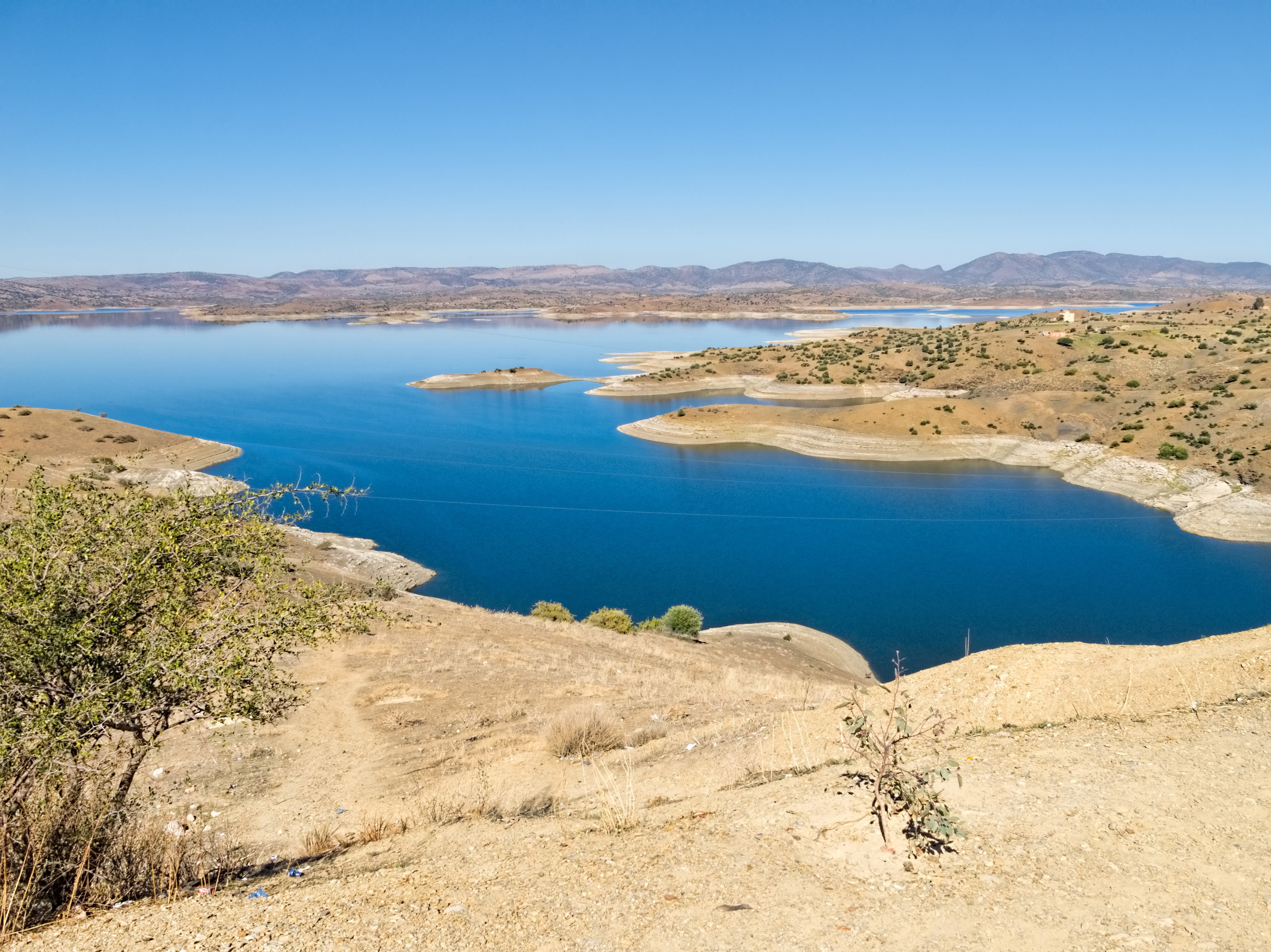 Ahmed el-Hansali Dam, Morocco